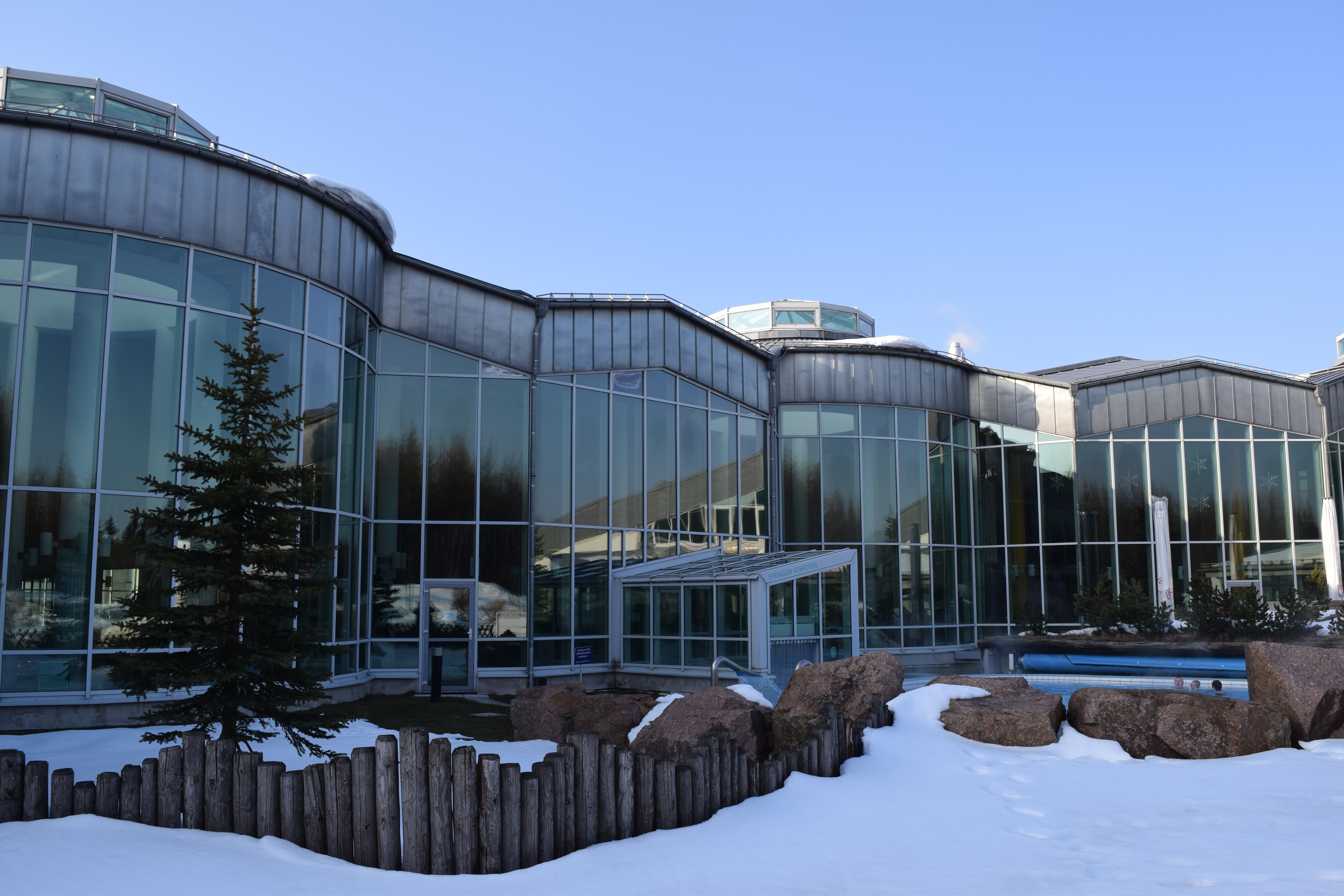 Raupennest